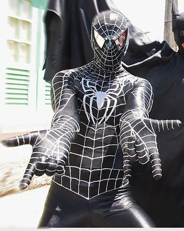 Carnival in Olinda. Foto: Passarinho/Pref.Olinda